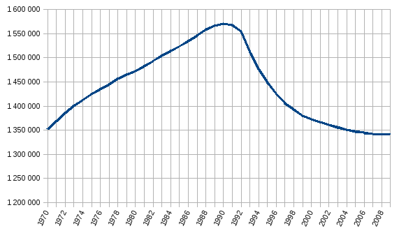 Eesti rahvaarv, 1970-2009, andmed: Statistikaamet